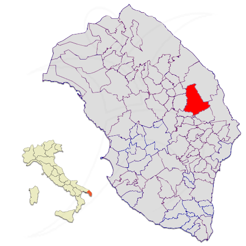 Il territorio di Carpignano Salentino nella provincia di Lecce